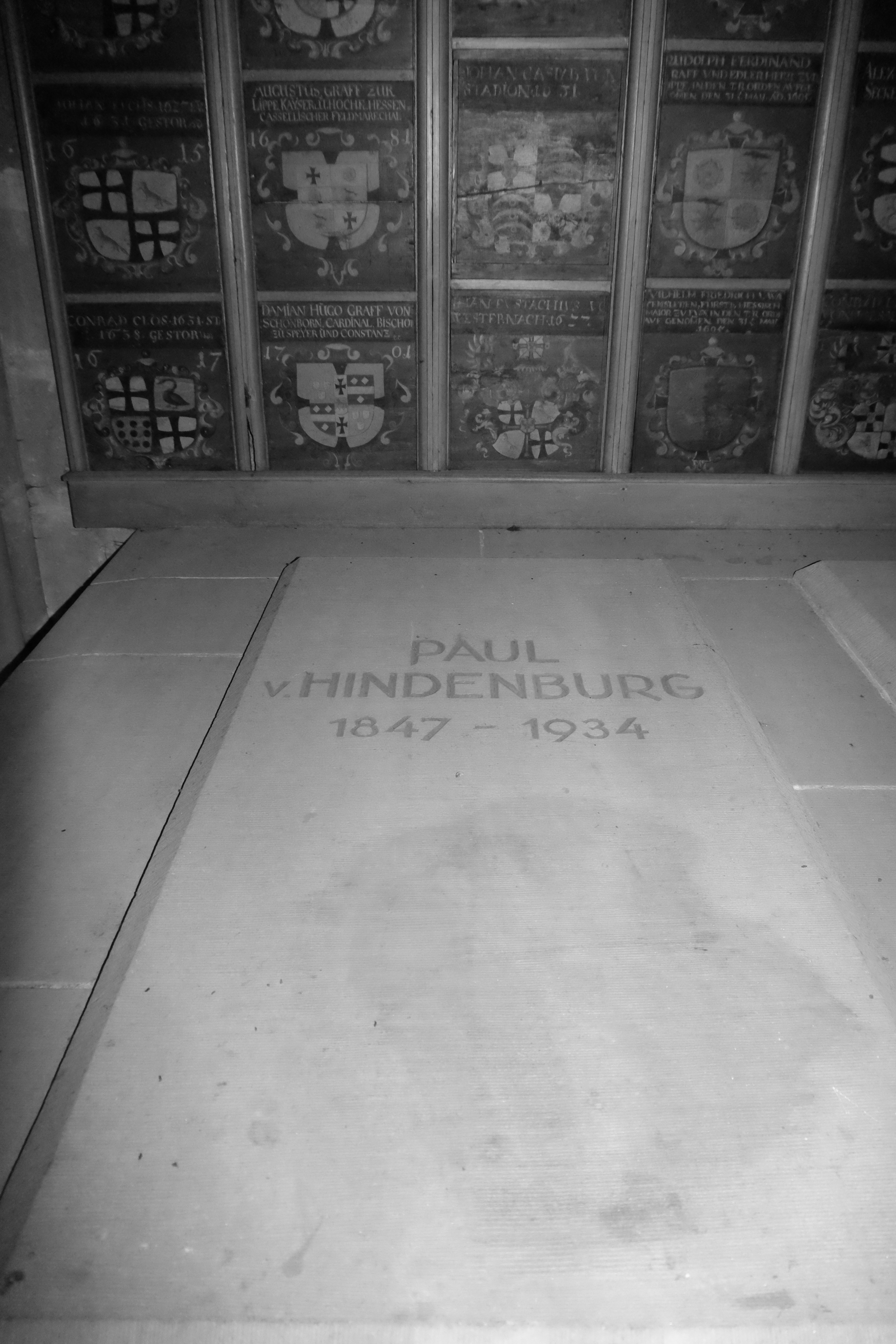 Grab von Hindenburg in der E-Kirche in Marburg